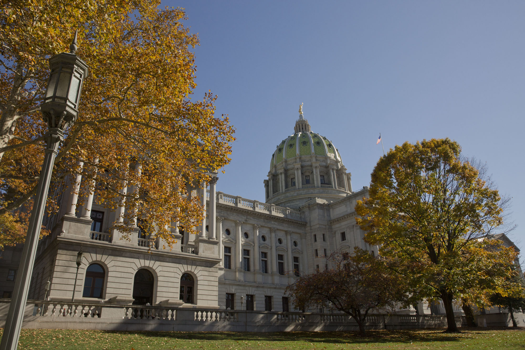 November 4, 2015 Harrisburg, PA